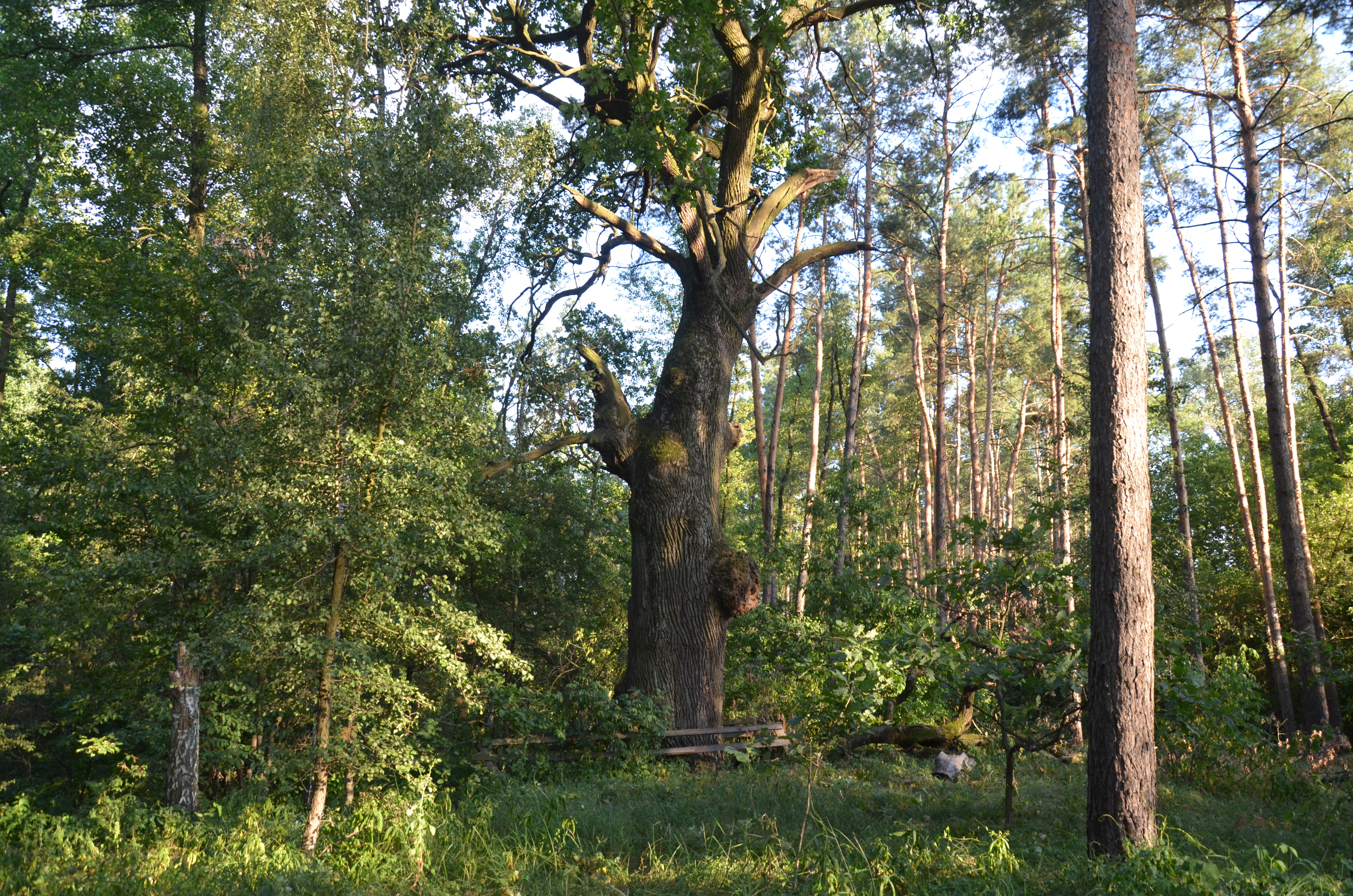 Вікові дерева дуба, Голосіївський район Дачне л-во кв.51-2 3 дерева від платформи "Романків" 0,6 км на N, зупинки "Сокіл" 2,9 км на WWS, кв.47-29 2 дерева 0,5 км на N від перших